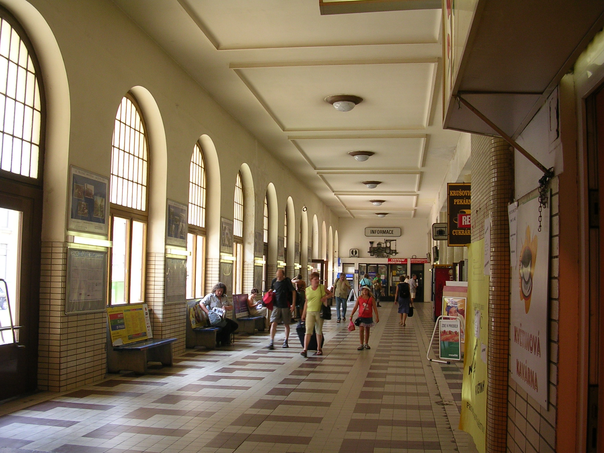 Masarykovo nádraží, jižní chodba v odbavovací budově.